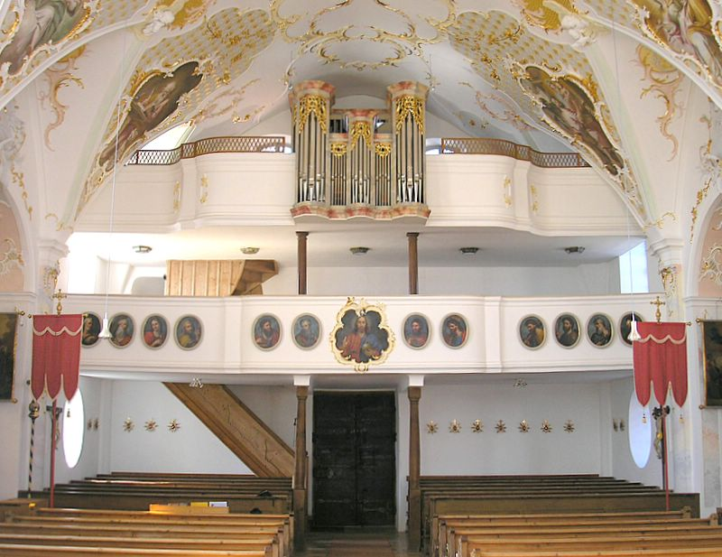 Pfarrkirche Mariä Himmelfahrt (Türkenfeld, Landkreis Fürstenfeldbruck, Oberbayern). Innenansicht nach Westen. Eigene Aufnahme, Febr. 2007 / Parish church "Assumption of Mary" (Tuerkenfeld near Fuerstenfeldbruck, Upper Bavaria, Germany). Interior, looking west. Own photo, Febr. 2007